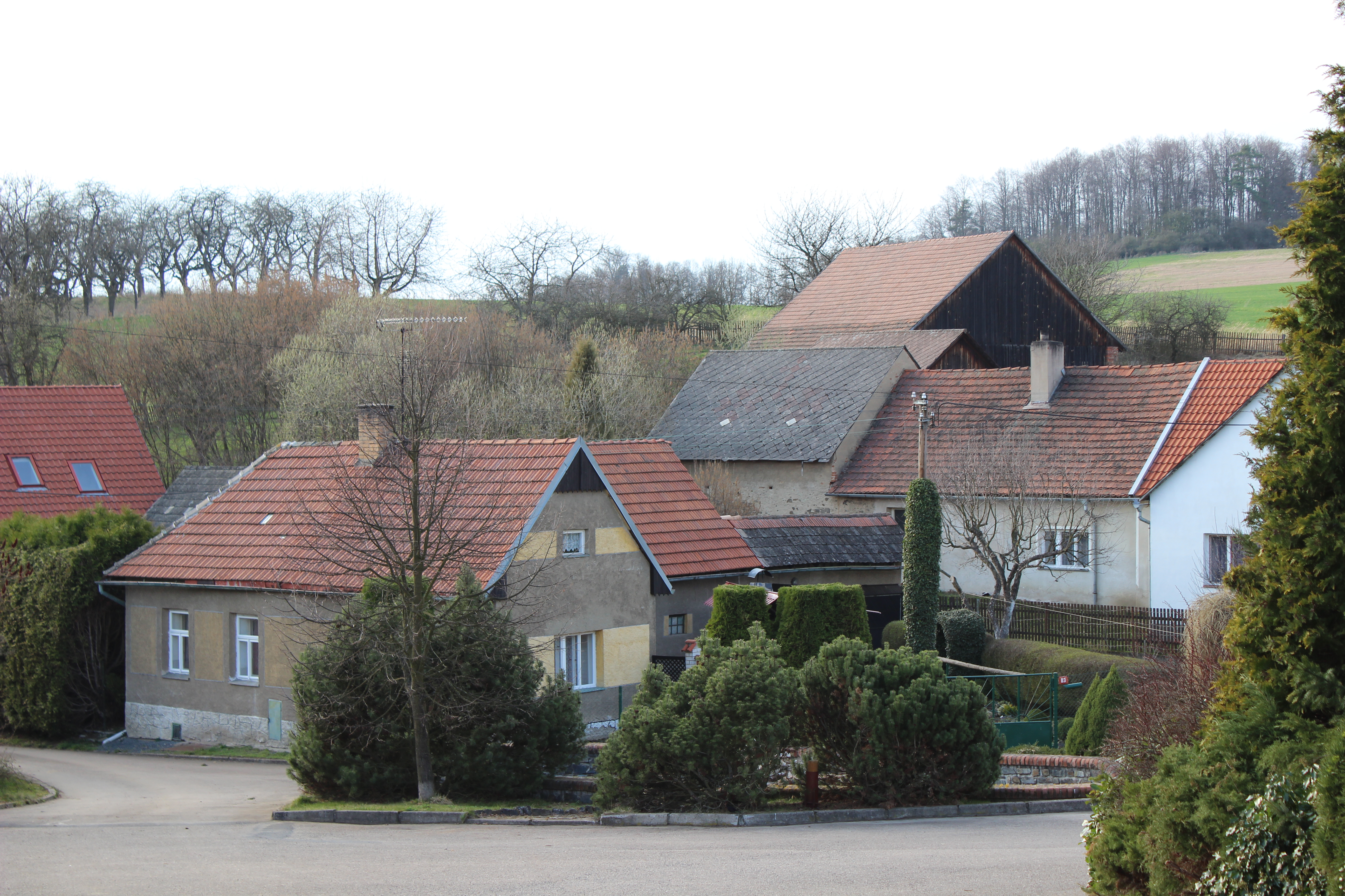 Zástavba ve Stranném. This photograph was taken with a Canon EOS 600D.